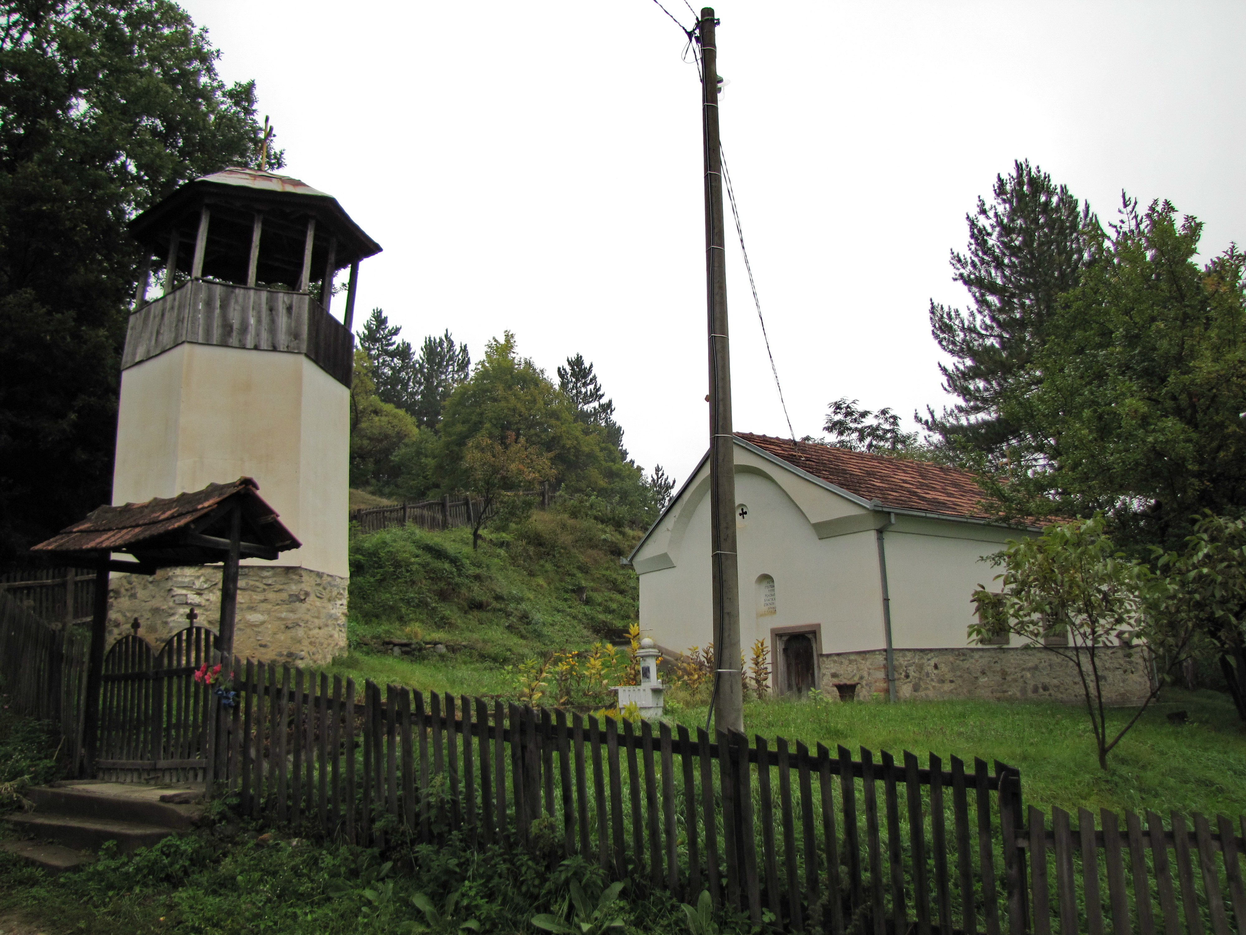 Црква св. Филипа у селу Бистар (Босилеград).